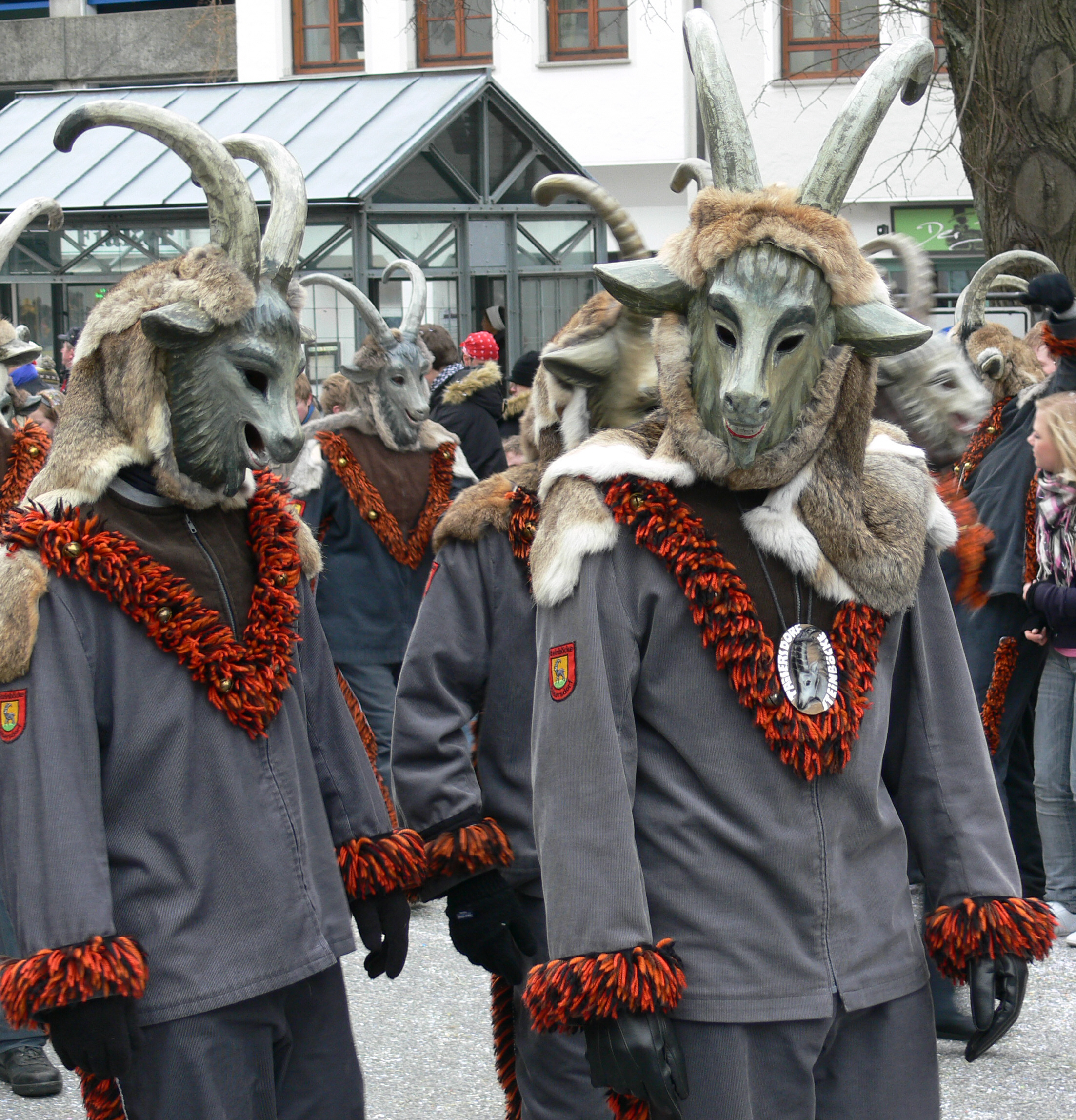 Narrensprung am Fasnetsmontag, 4. Februar 2008 in Ravensburg: Steinböcke der Steinbockzunft Taisersdorf (Owingen)